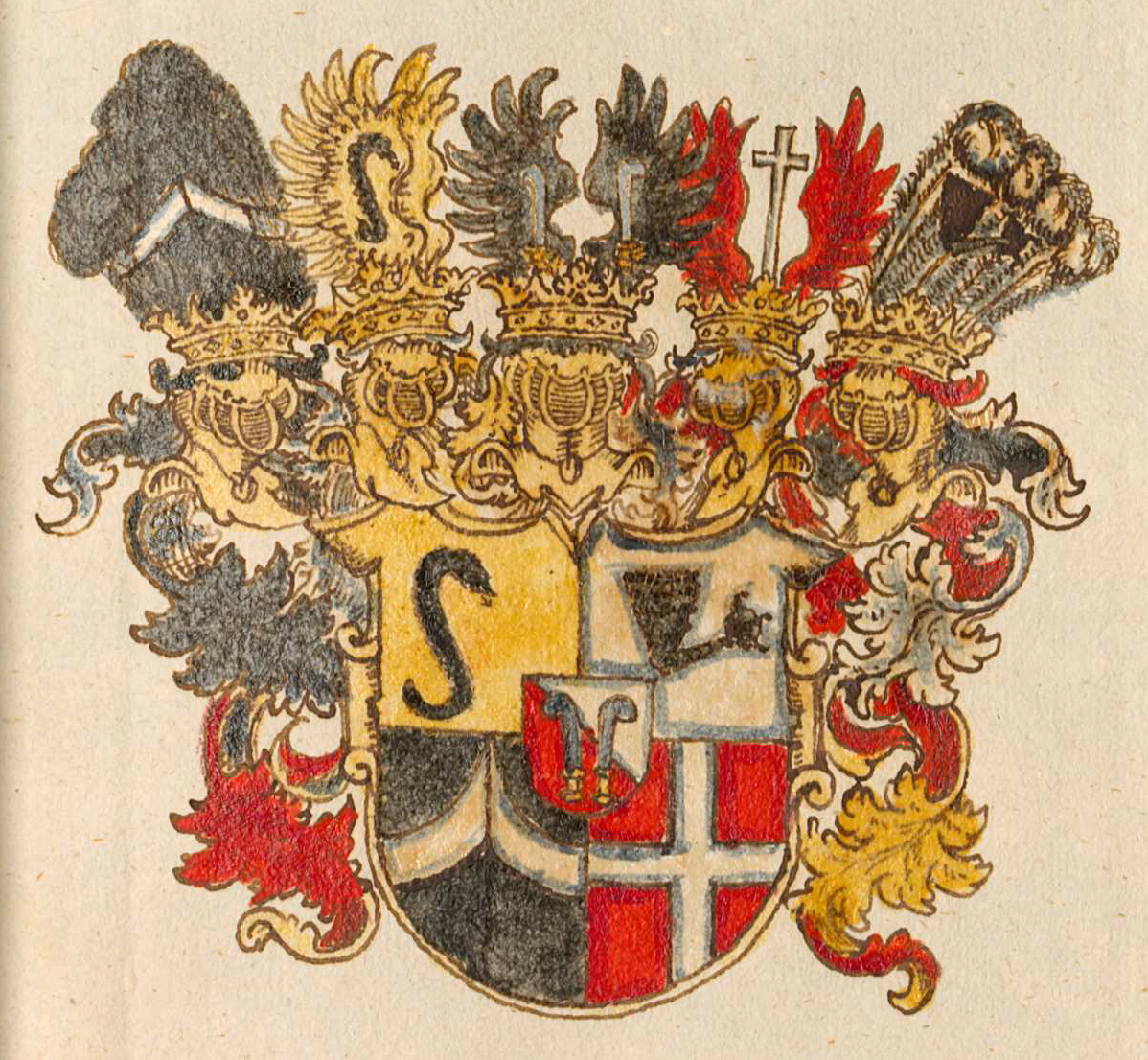 Wappen eines Freiherrn von Dietrichstein